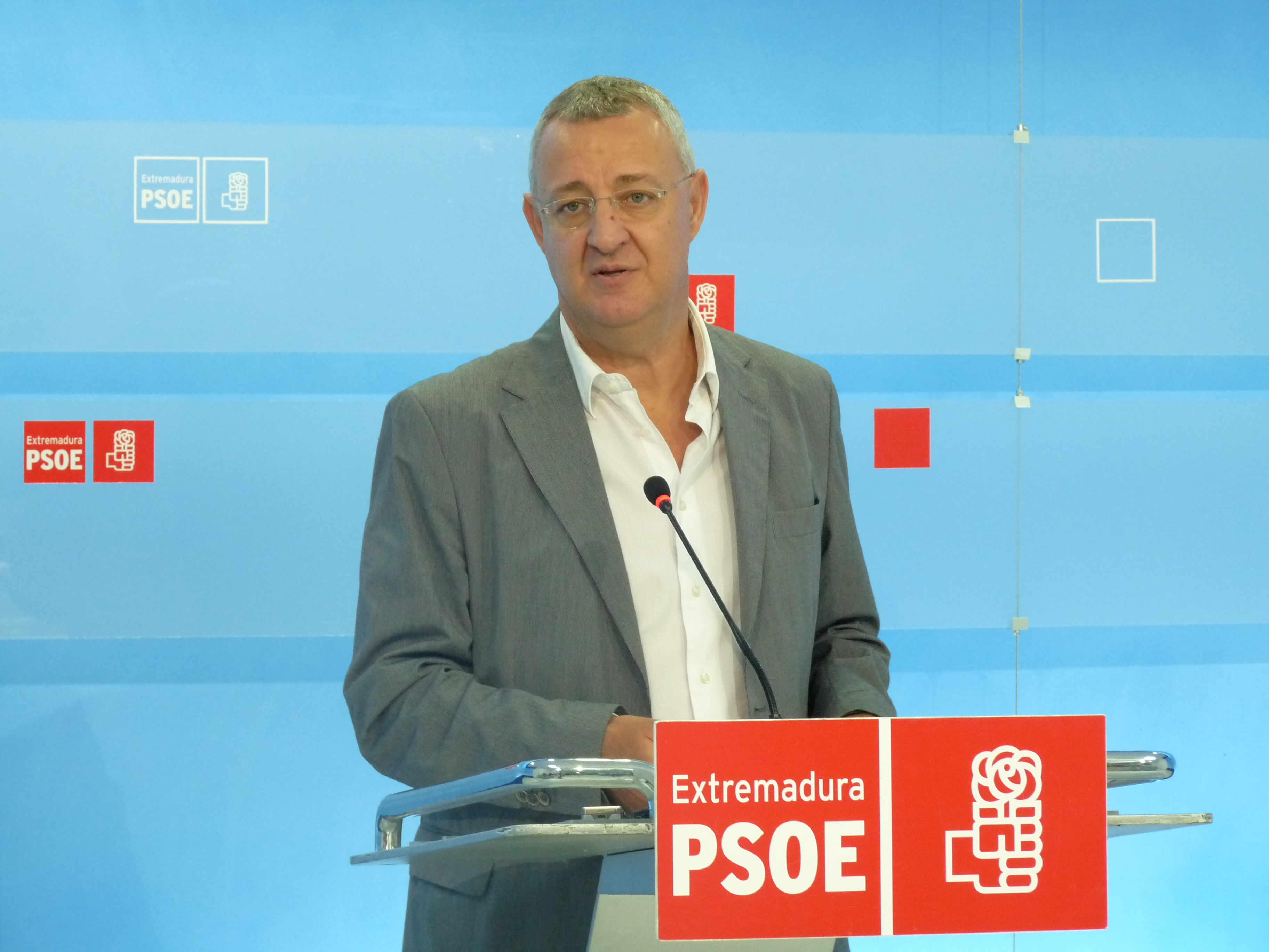 Jesús Caldera presenta informe "Impacto Reforma Laboral en Extremadura"